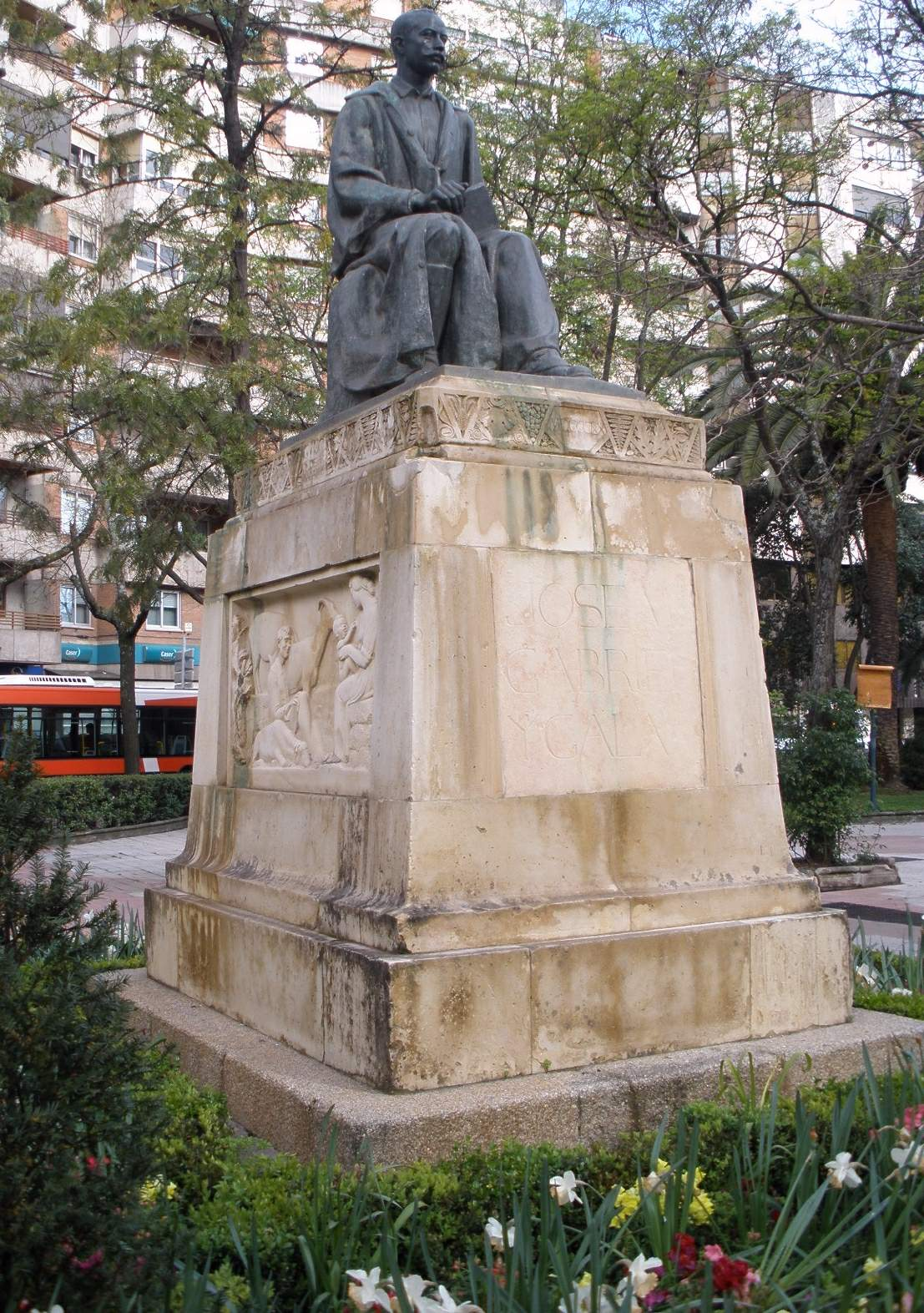 Cáceres - Paseo de Cánovas, Monumento a José María Gabriel y Galán